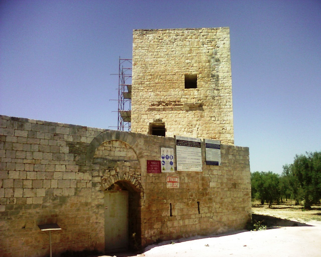 balsignano - Modugno (bari)-Italy